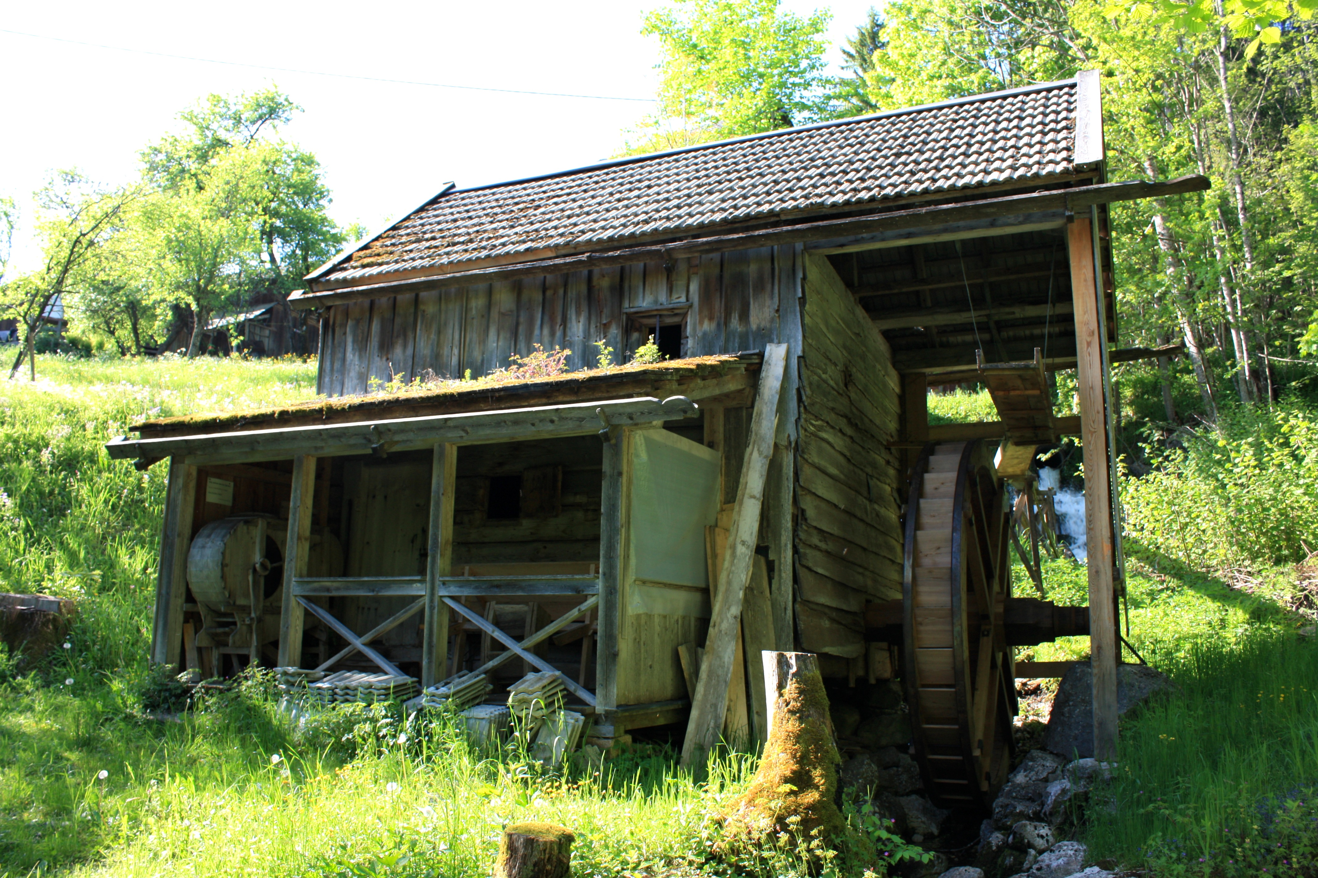 Die Mühlberg-Mühle in Altaussee